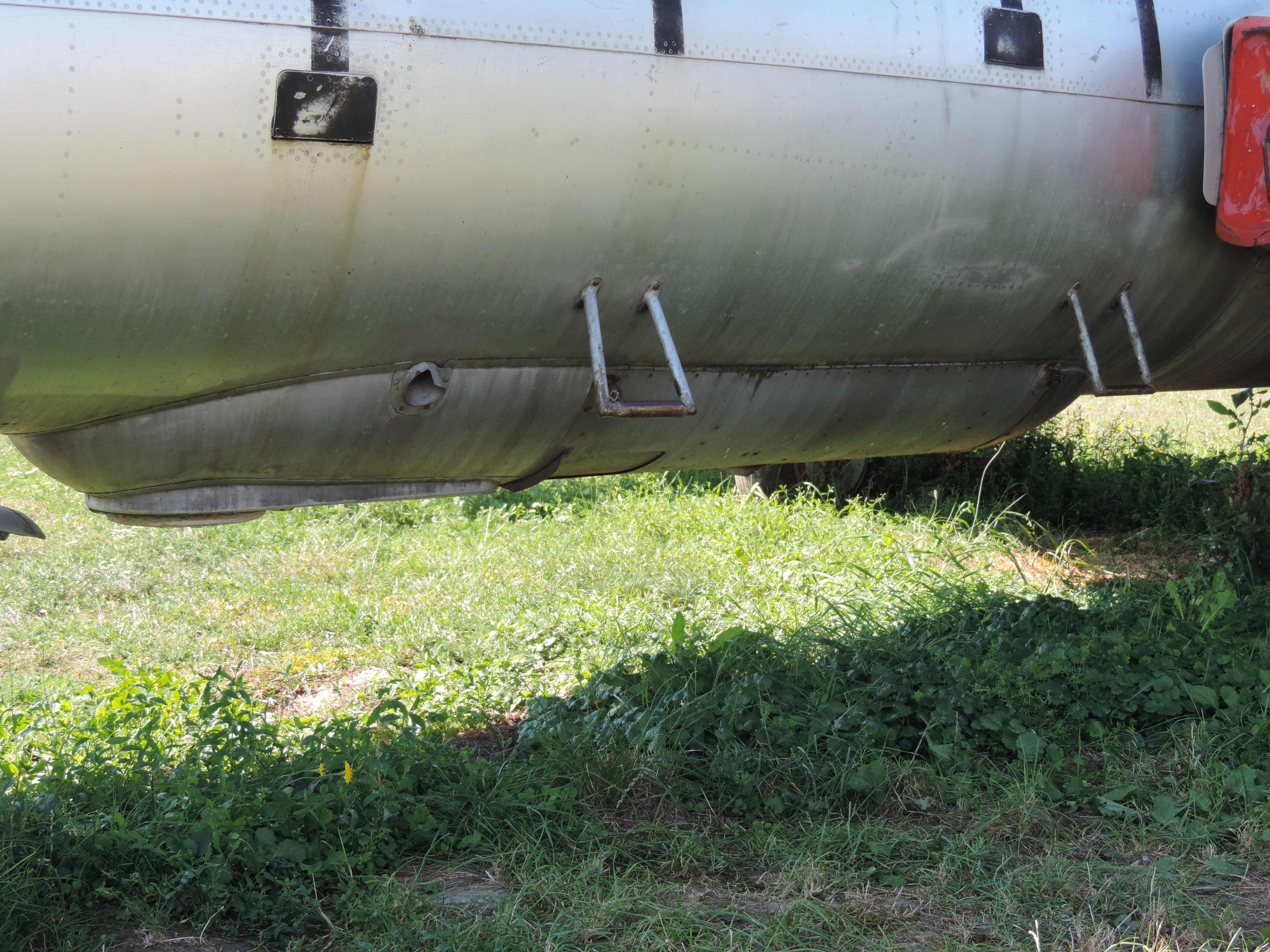 Aero L - 29 R Delfin Detail im Letecké muzeum Kunovice